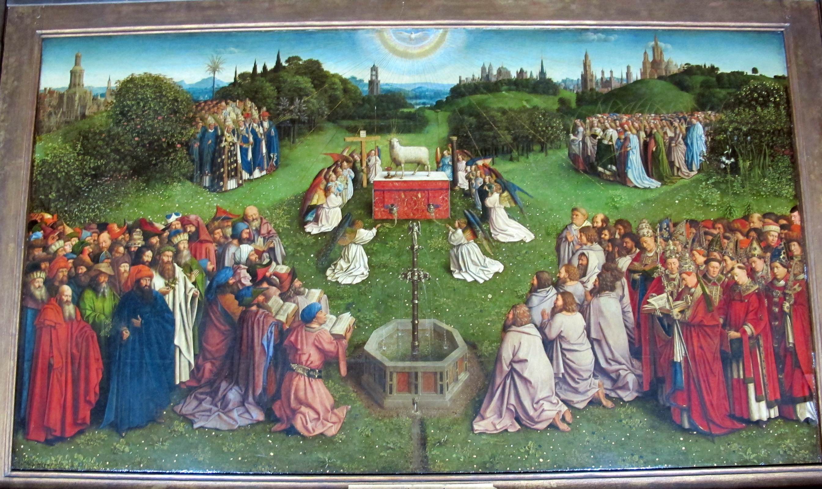 Gand, san bavone, int., polittico dell'agnello mistico